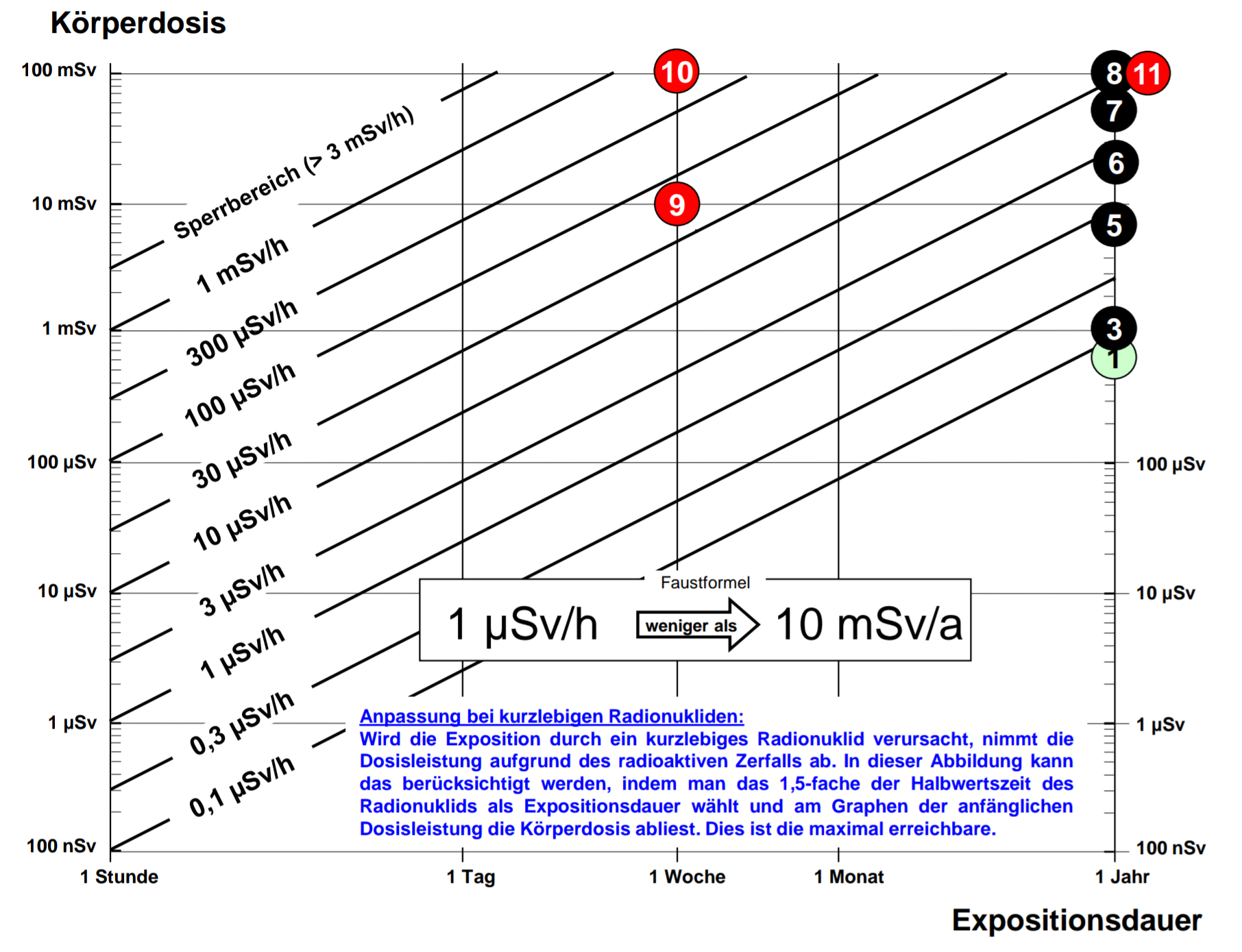 Dosisaufnahme bei äußerer Strahlenexposition und bekannter Dosisleistung